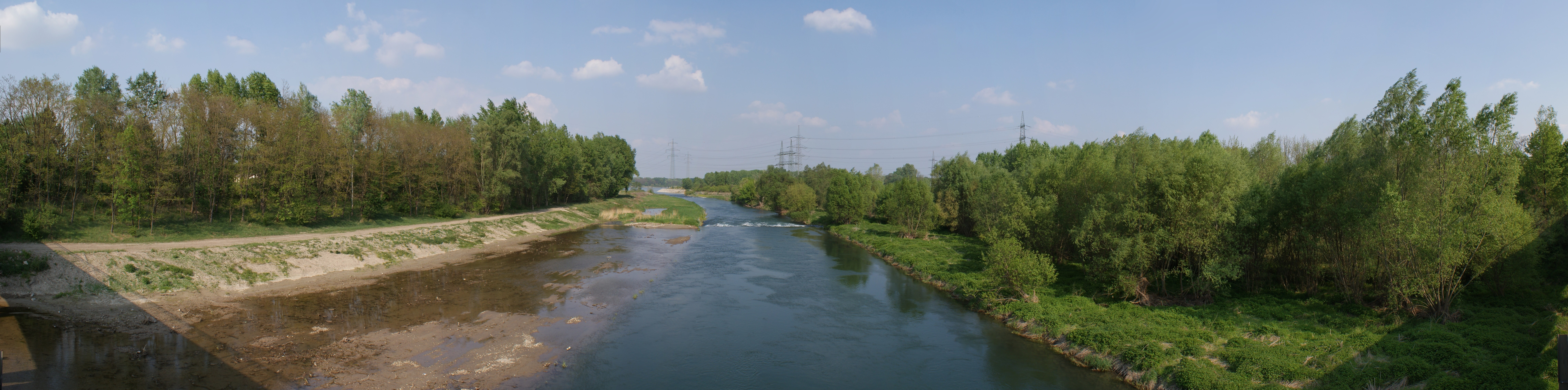 Die letzten Meter der Traisen vor der Mündung in die Donau. Die Hochspannungsleitungen kommen vom Kraftwerk Altenwörth.